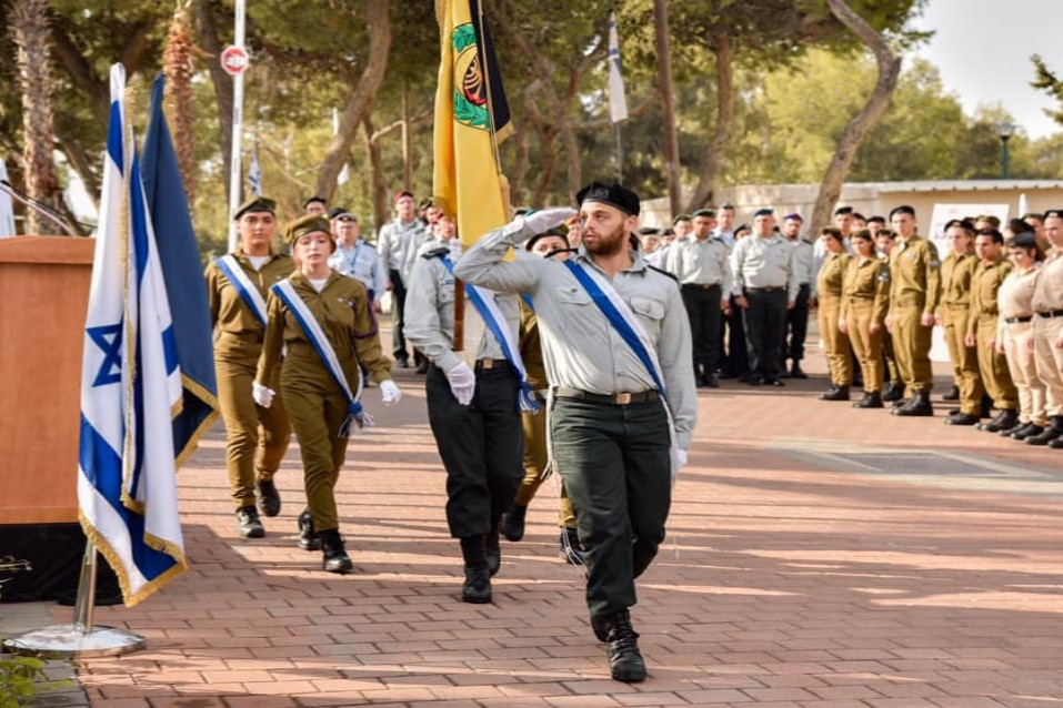 טקס הקמת מערך קשרי החוץ של צה"ל במחנה אביב (2018)